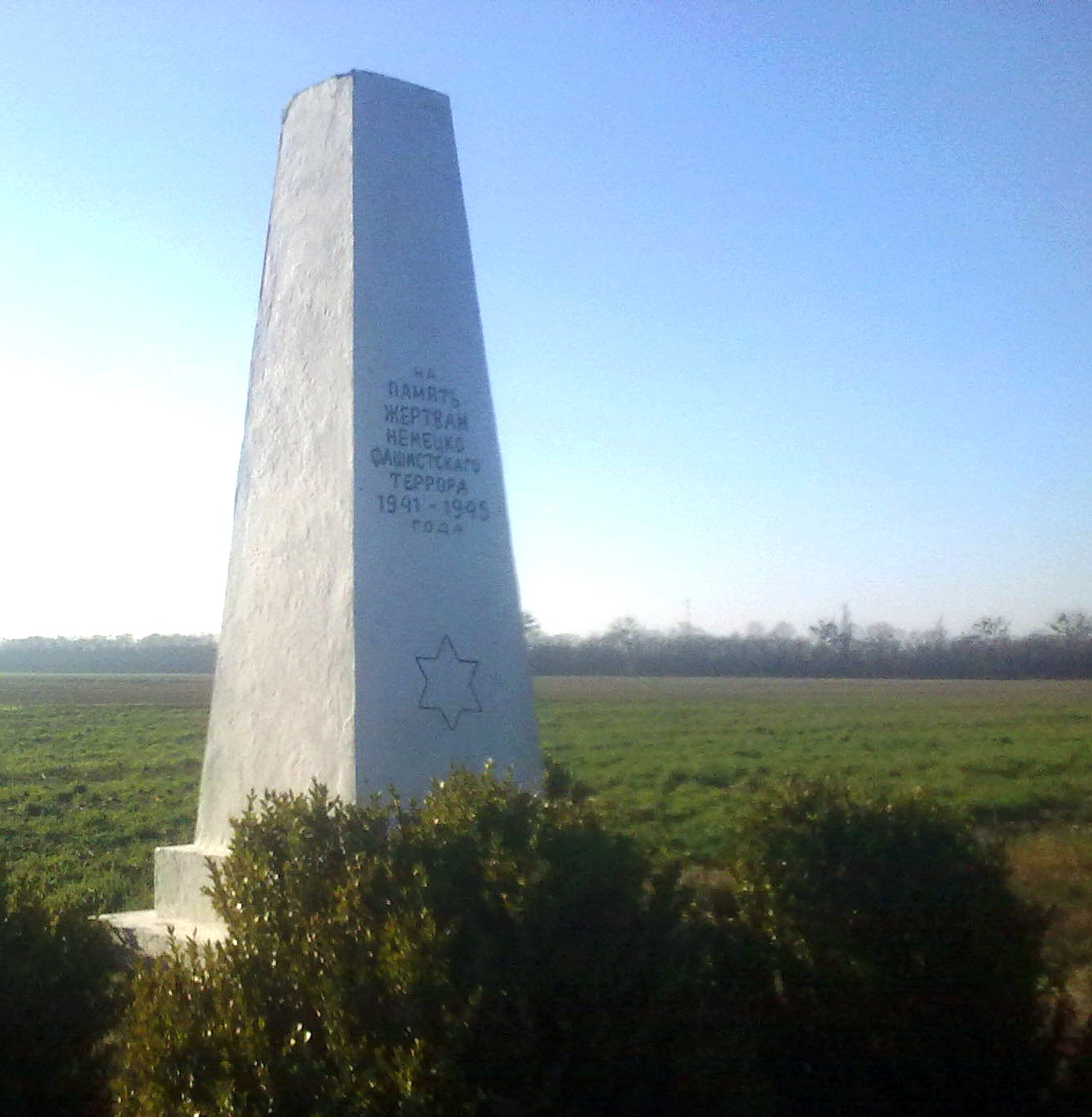 Памятник убитым евреям - узникам гетто в поселке Томашовка Брестского района. Установлен в 1954 году.